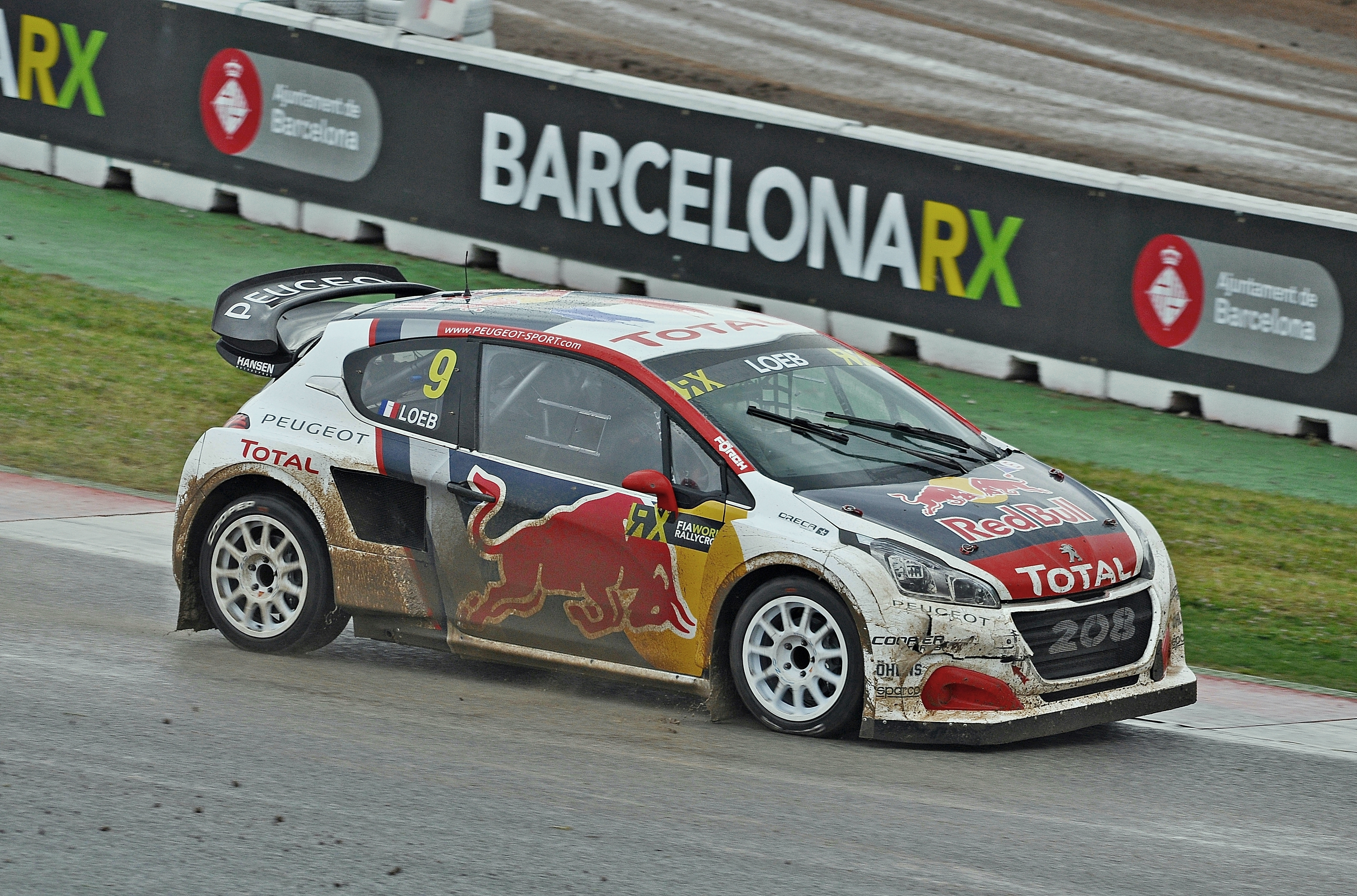 RX Barcelona